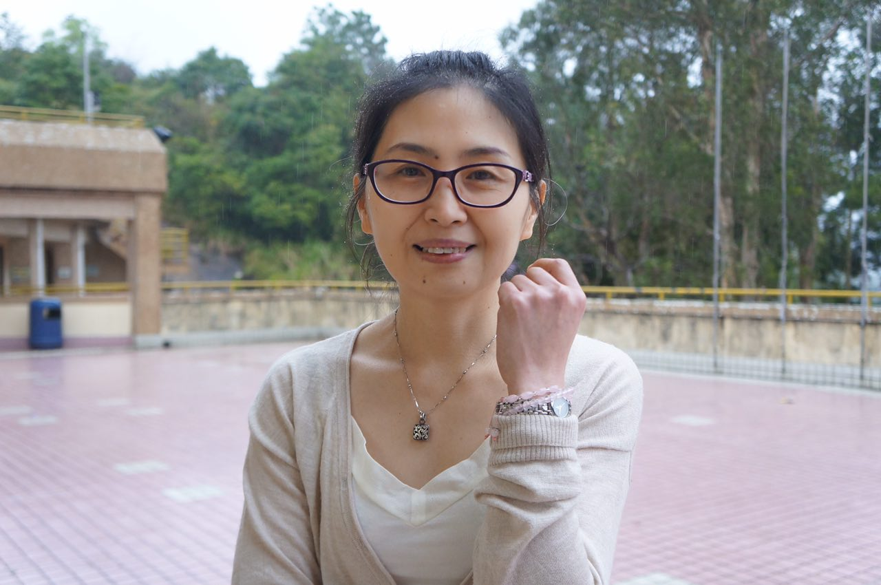 梁波